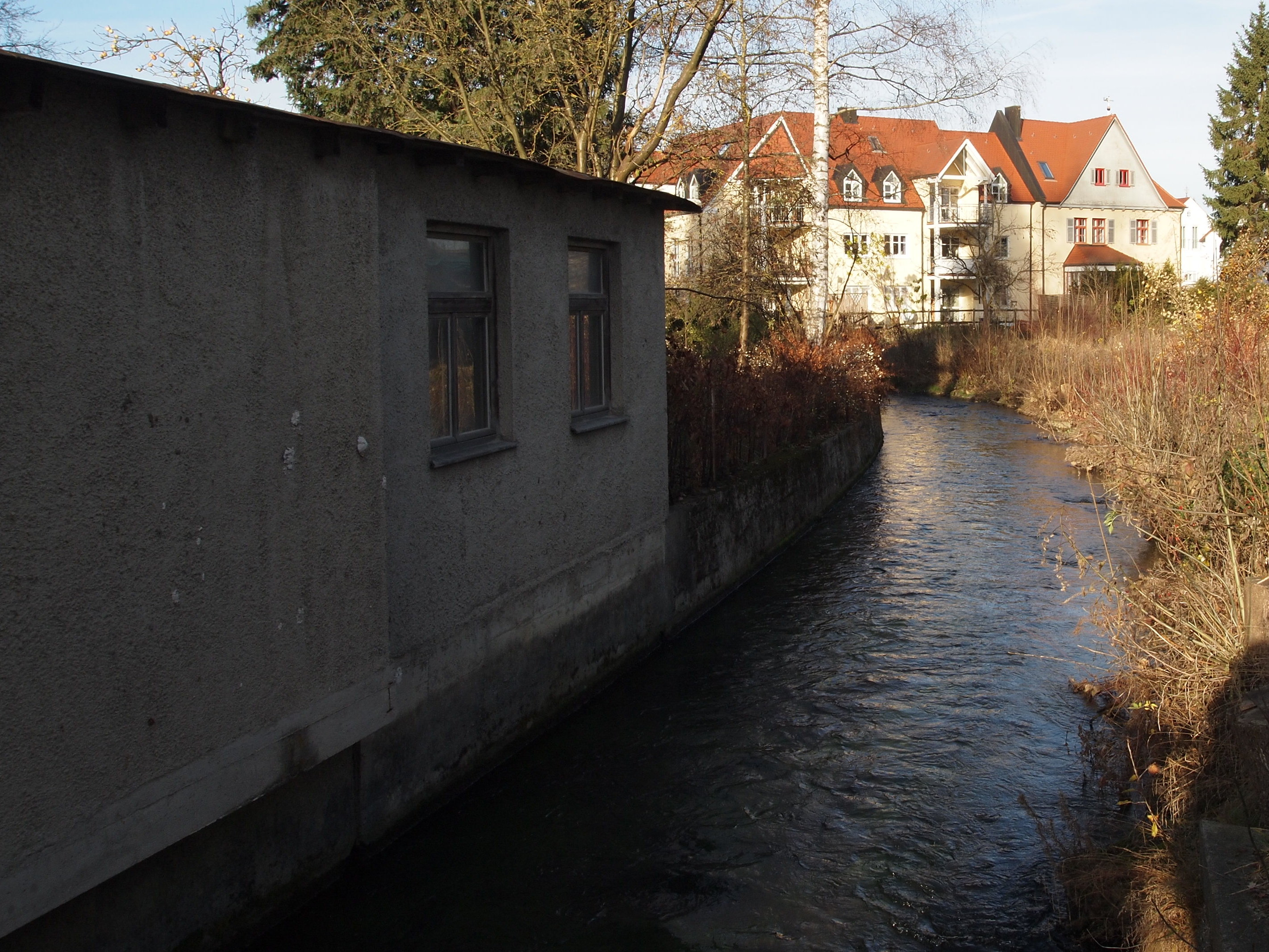 Die Mindel in Mindelheim in Höhe der Brücke Inselweg